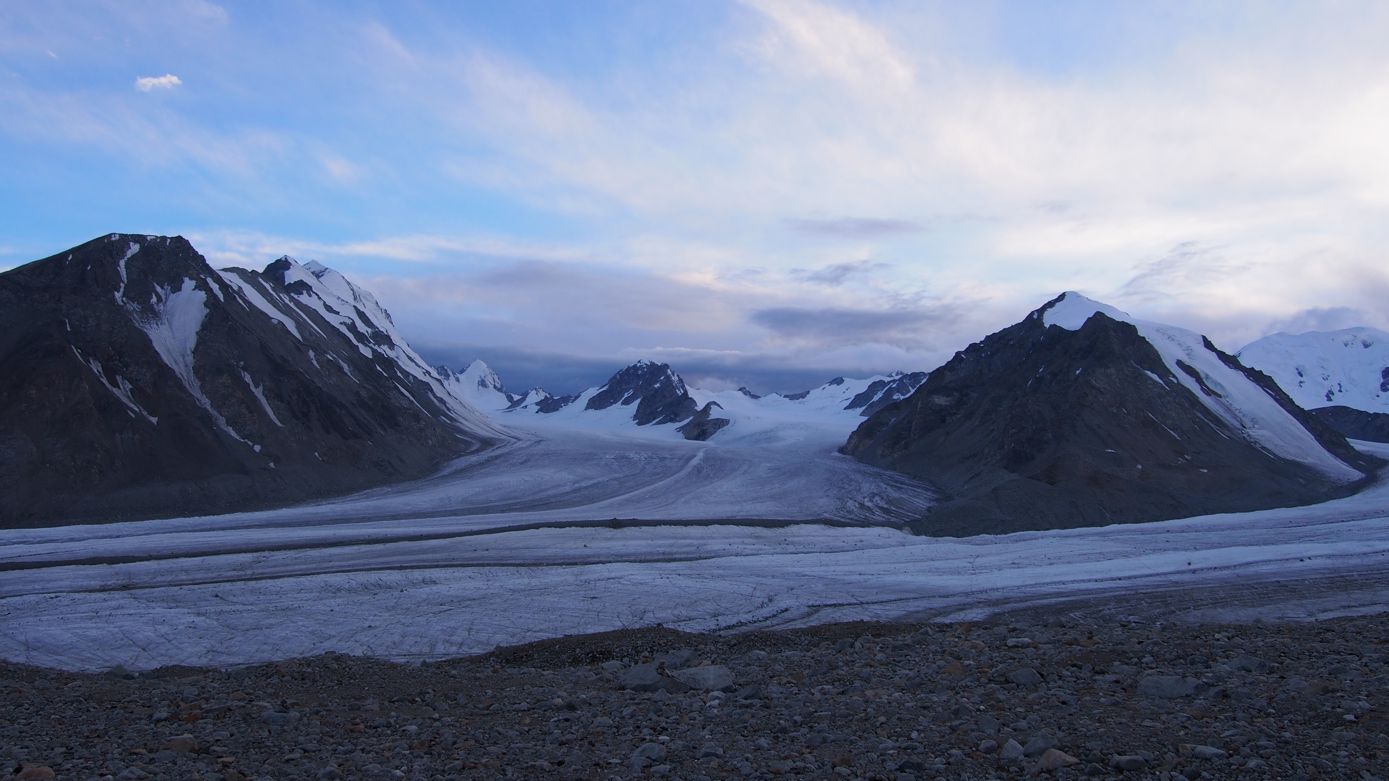 Potaninův ledovec z Base campu masivu Tavan Bogd